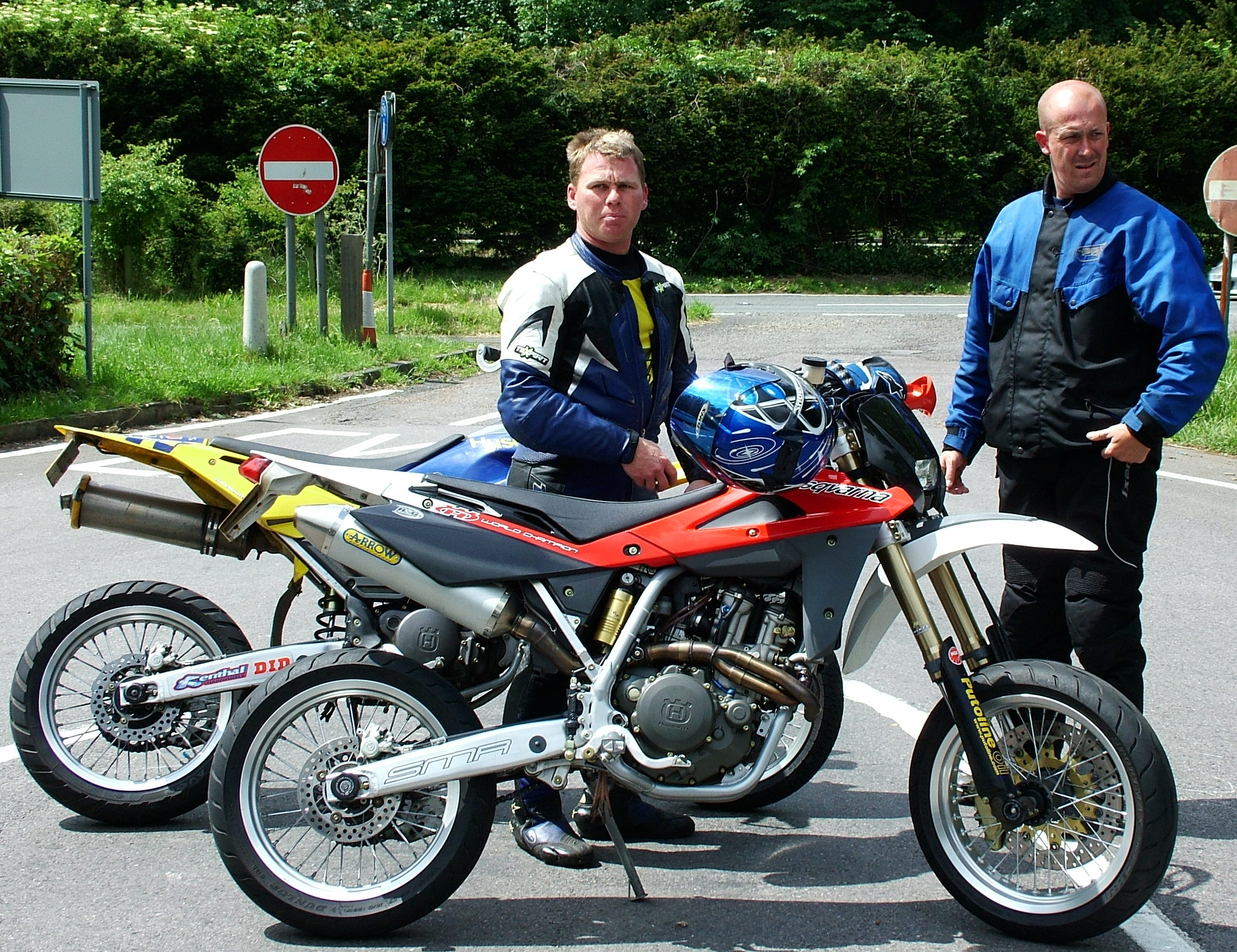 Husqvarna Supermotard motorcycles